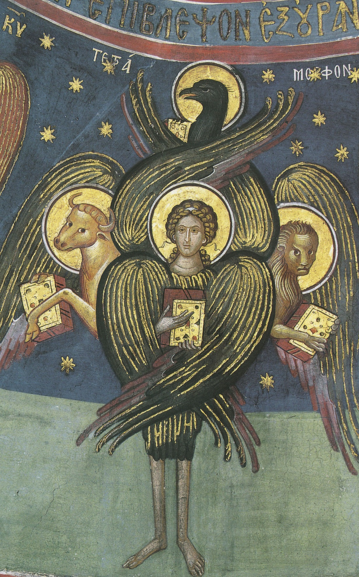 Tetramorph. Fresco, Meteora.